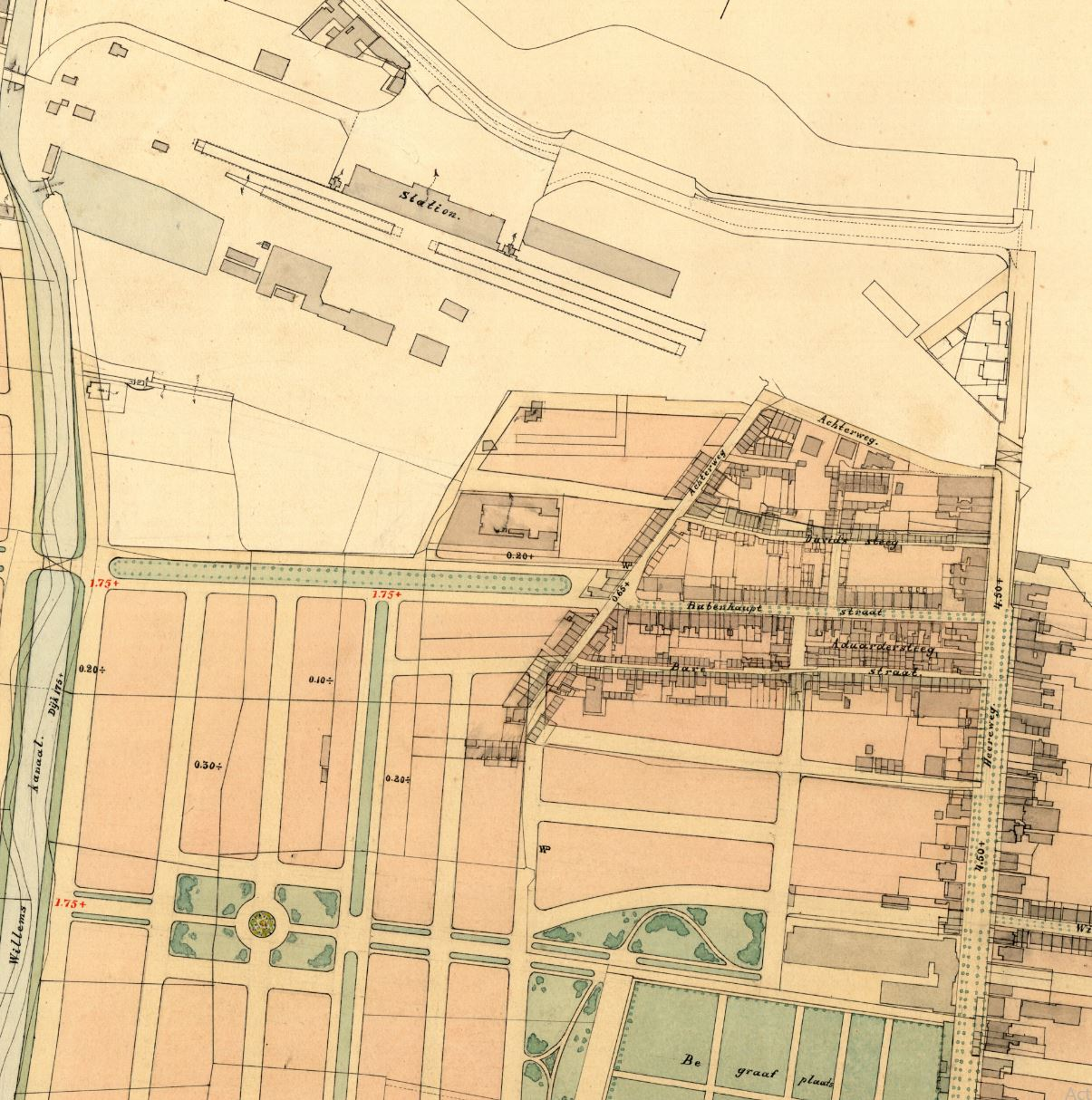 Uitsnede van File:Plan van Uitleg - Plattegrond buurten ten zuiden van de station.jpg met daarop het station en de Davidstraatbuurt en omgeving.